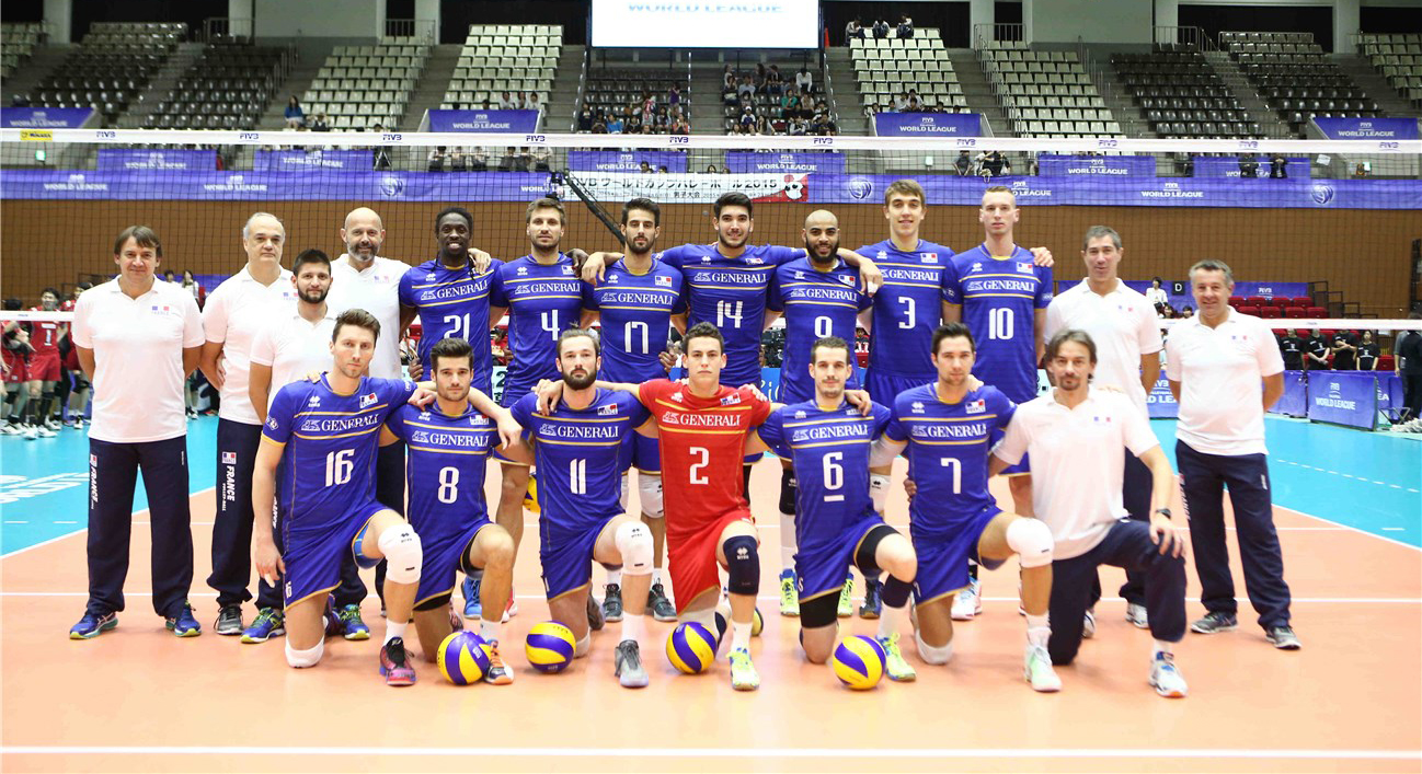 photo de l equipe volley 2015